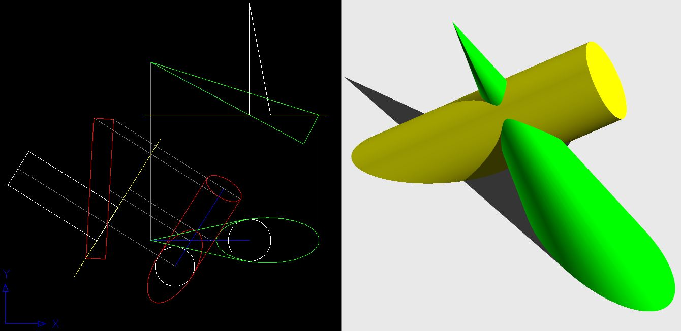 quartica d'intersezione tra due superfici di rotazione